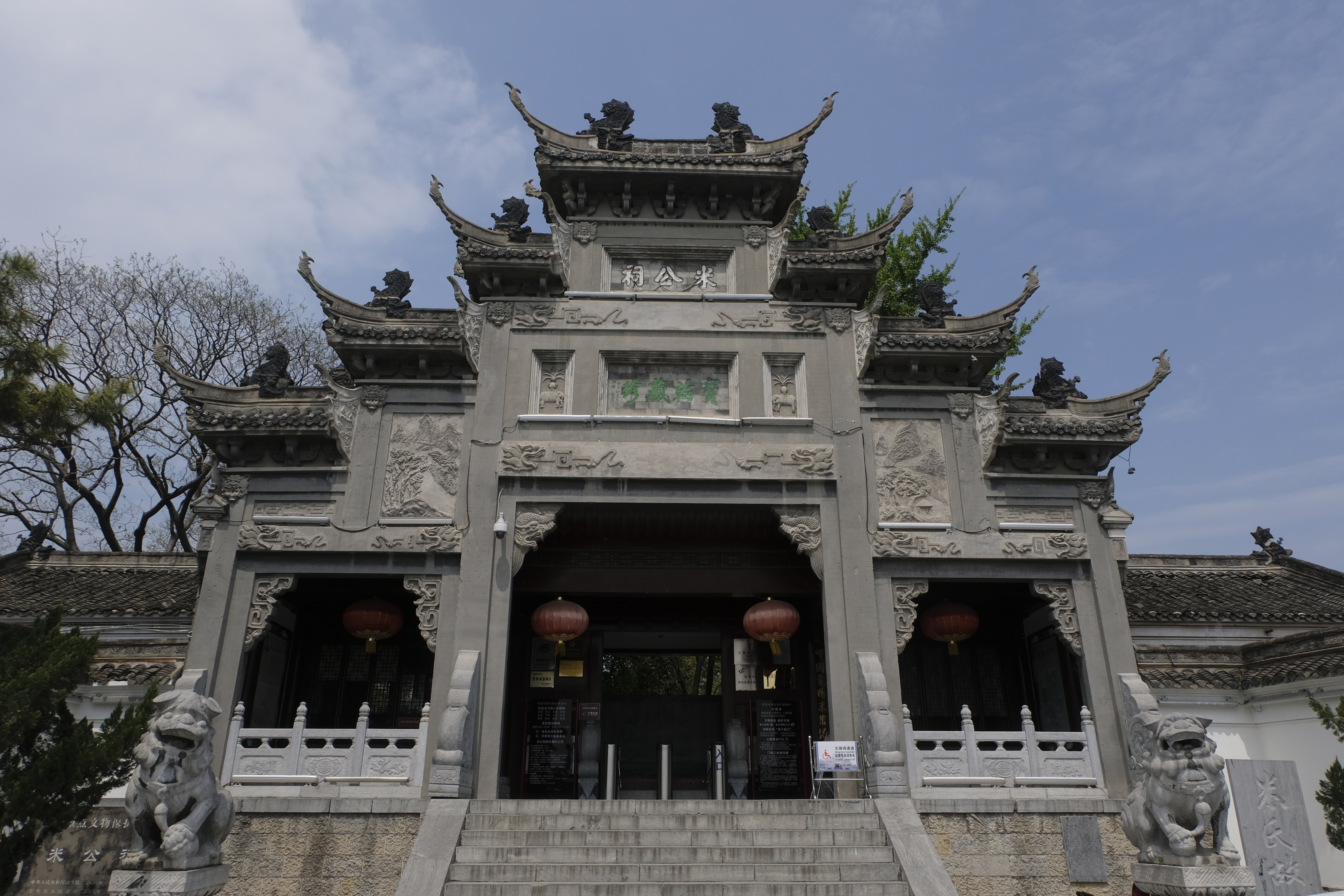 米公祠正门